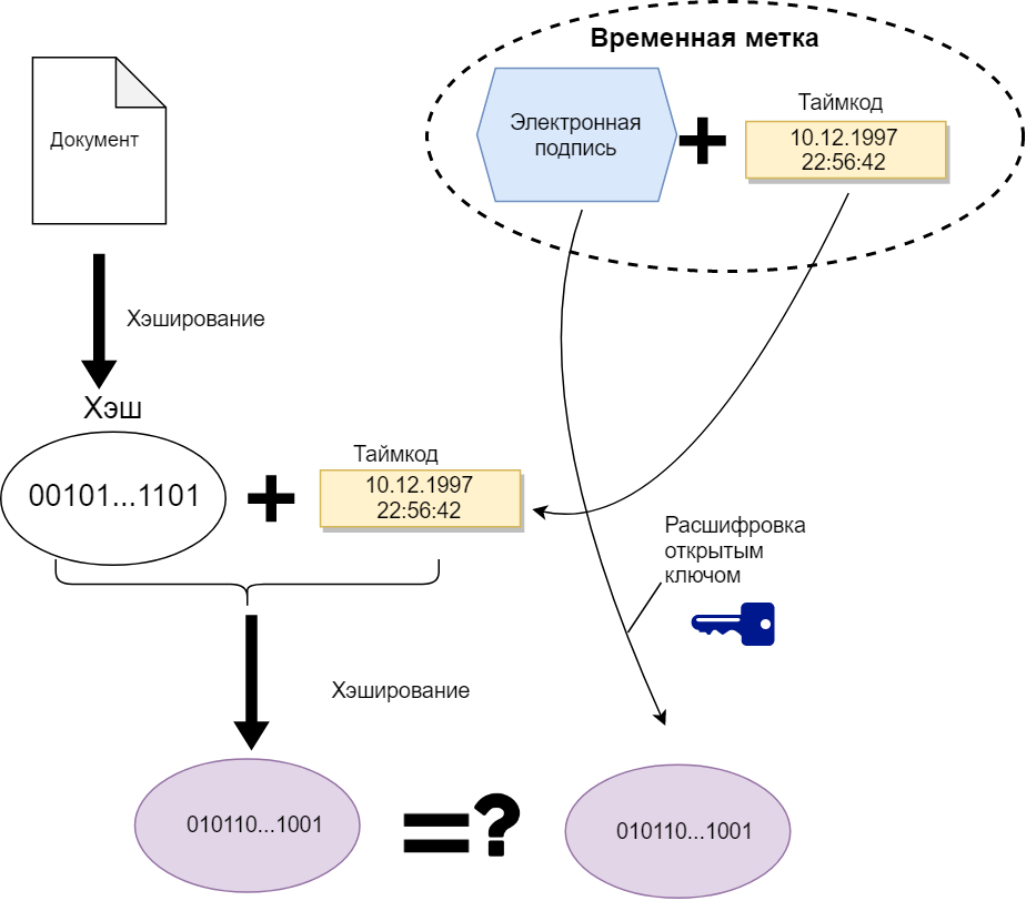 Алгоритм проверки временной метки, созданной на основе алгоритма шифрования с открытым ключом.